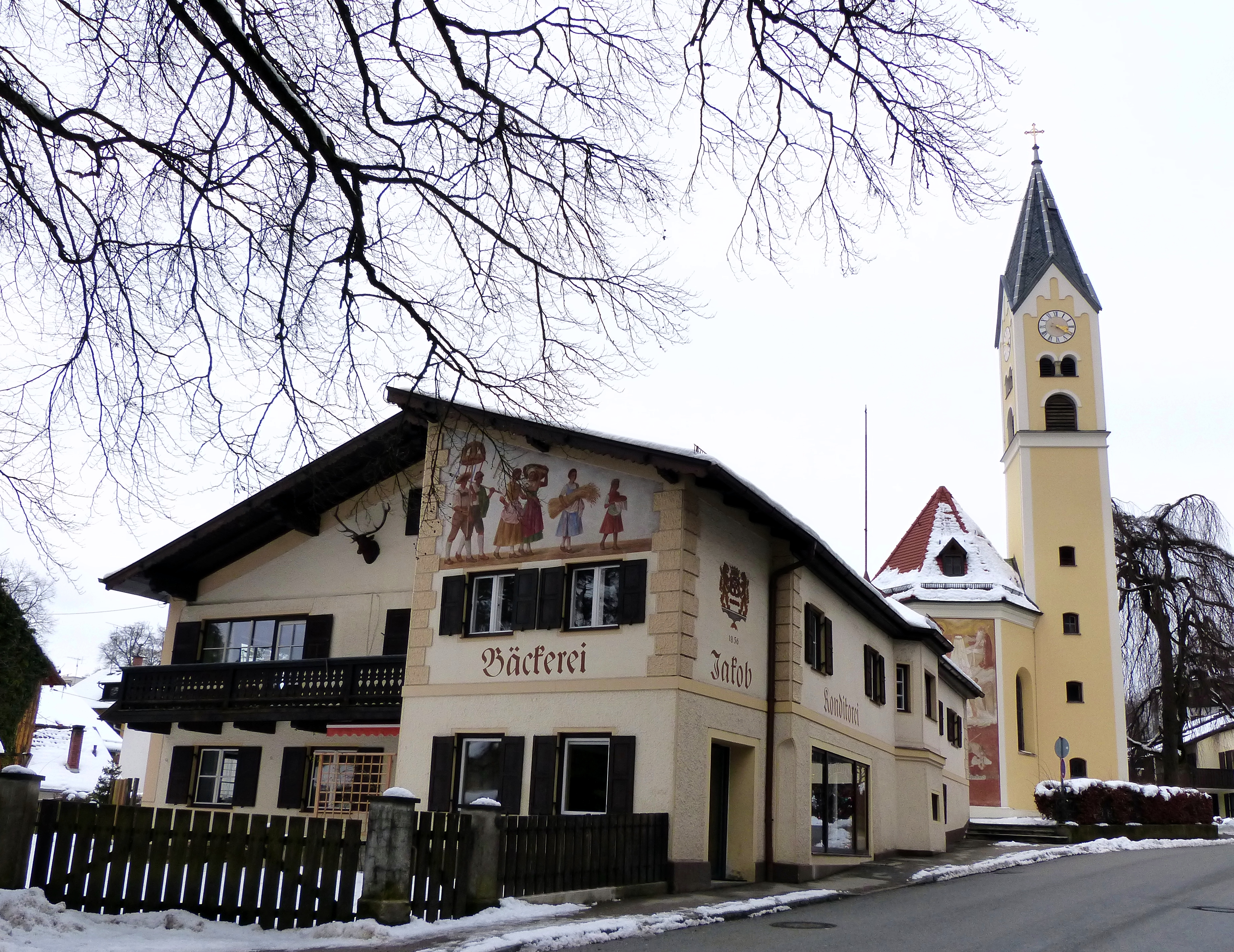 Feldafing, Am Kirchplatz 11. Die ehemalige Feldafinger Taverne, ein zweigeschossiger Flachsatteldachbau unterhalb der Kirche St. Michael, stammt in ihrem Kern aus der Zeit um 1613. Durch Umbauten im Jahre 1856 und in der 2. Hälfte des 20. Jahrhunderts erhielt sie ihr heutiges Aussehen.